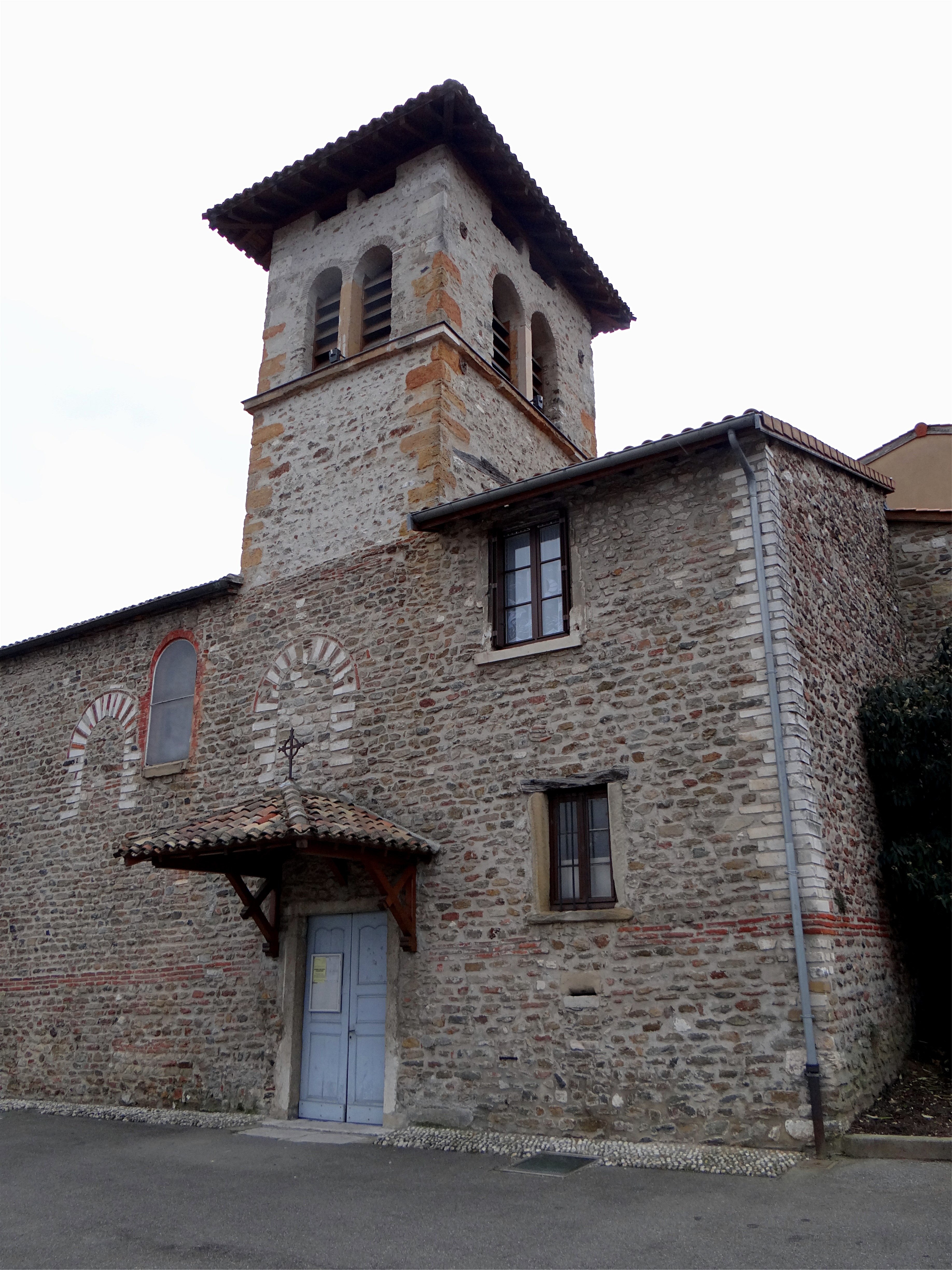 Eglise de Saint-Romain-en-Gal, Rhône, France. Classée en 1972.